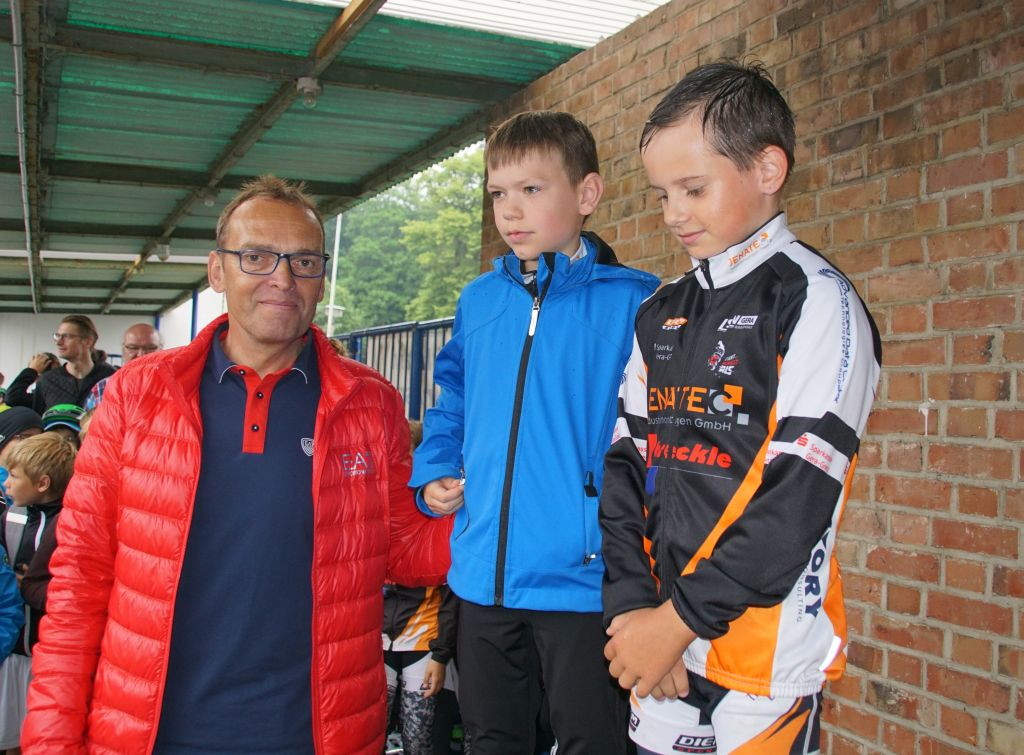 Olaf Ludwig mit Sportlern beim Olaf-Ludwig-Pokal 2018 in Gera